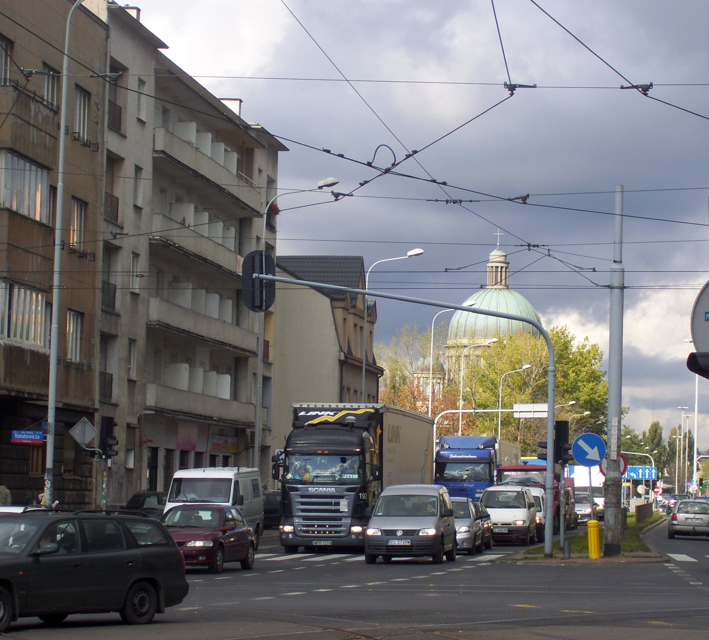 Droga Krajowa nr 14 w Łodzi w godzinie szczytu - zakorkowana ulica Kopcińskiego.